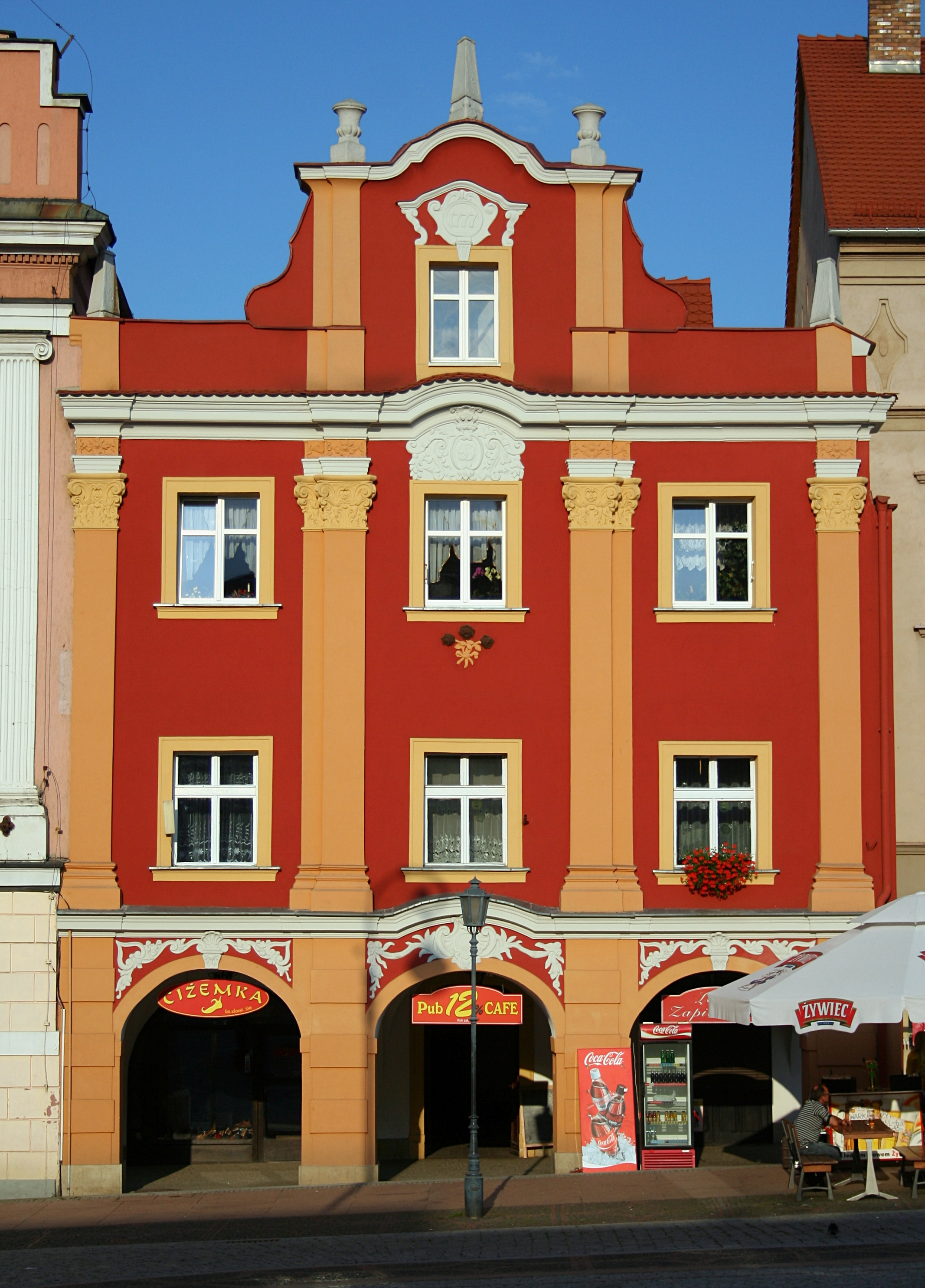 Wałbrzych, Rynek 22 - kamienica "Pod Trzema Różami" (zabytek nr 663 z 19.03.1960)